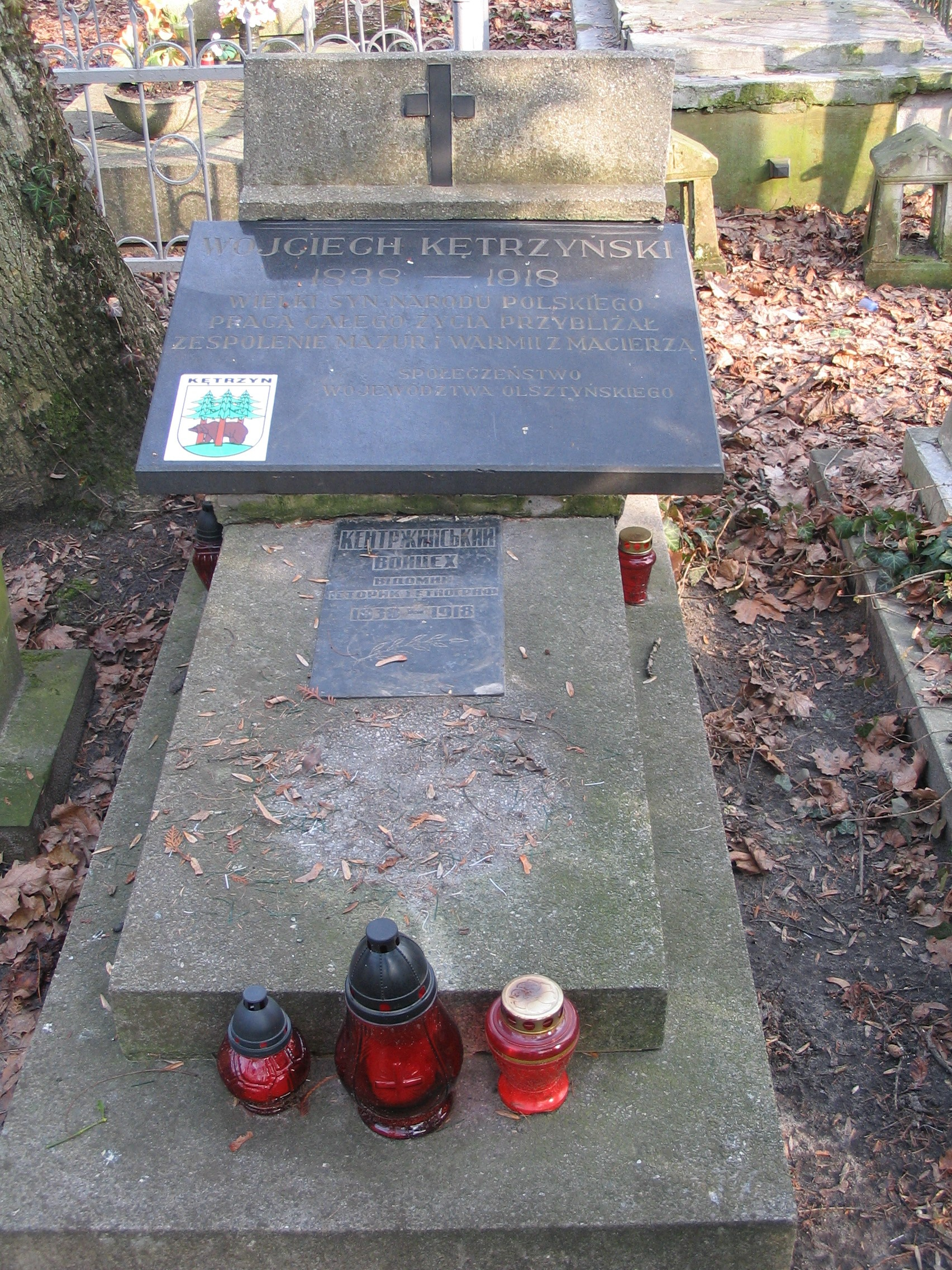 Grave of Wojciech Ketrzynski on Lychakowski Cemetery in Lwow